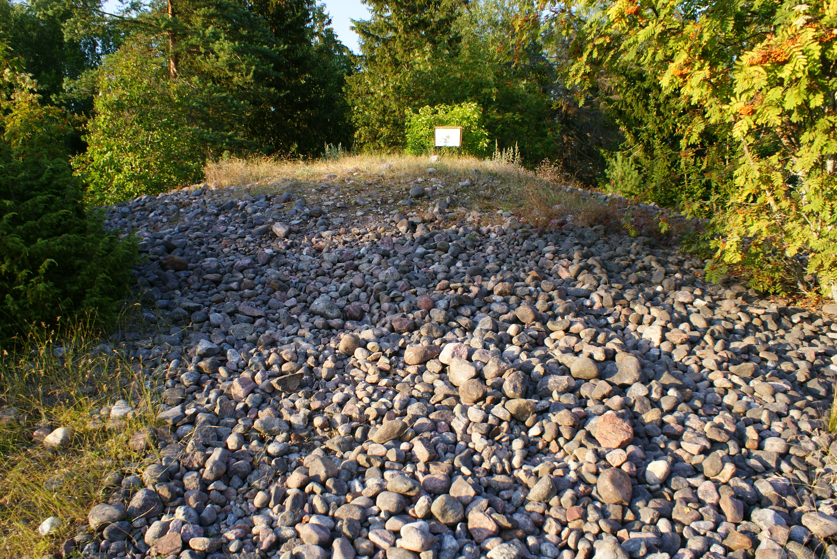 Koljuvare